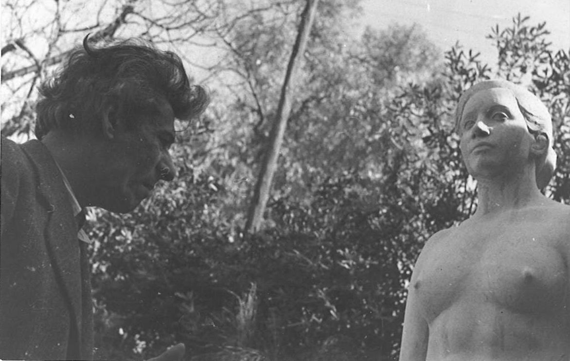 L'escultor Joan Rebull i Torroja al jardí de casa seva a Barcelona amb l'escultura La Ben Plantada.